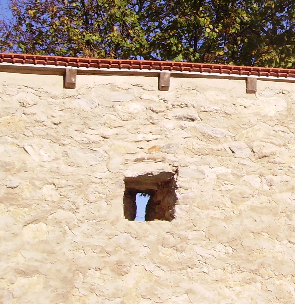 view of Hohenpölz, part of Heiligenstadt in Oberfranken in Upper Franconia, Germany